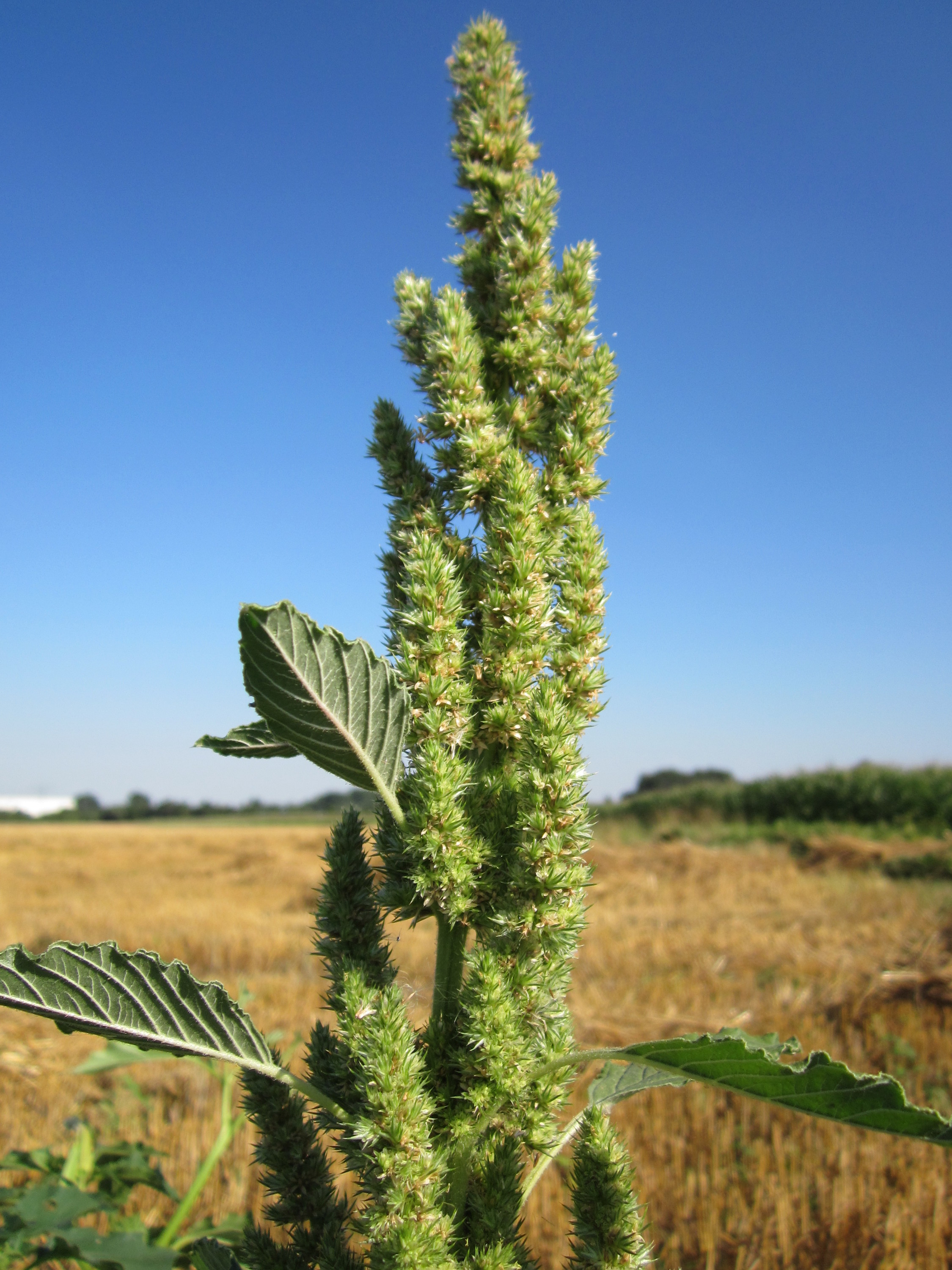 Zurückgebogener Amarant (Amaranthus retroflexus) im Hockenheimer Rheinbogen